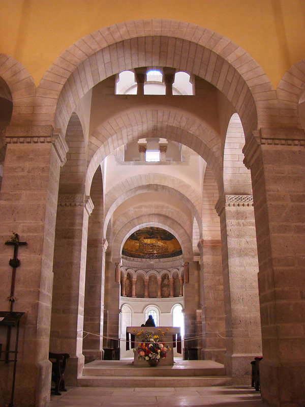 Oratoire carolingien de Germigny-des-Prés, Loiret, Centre, France.